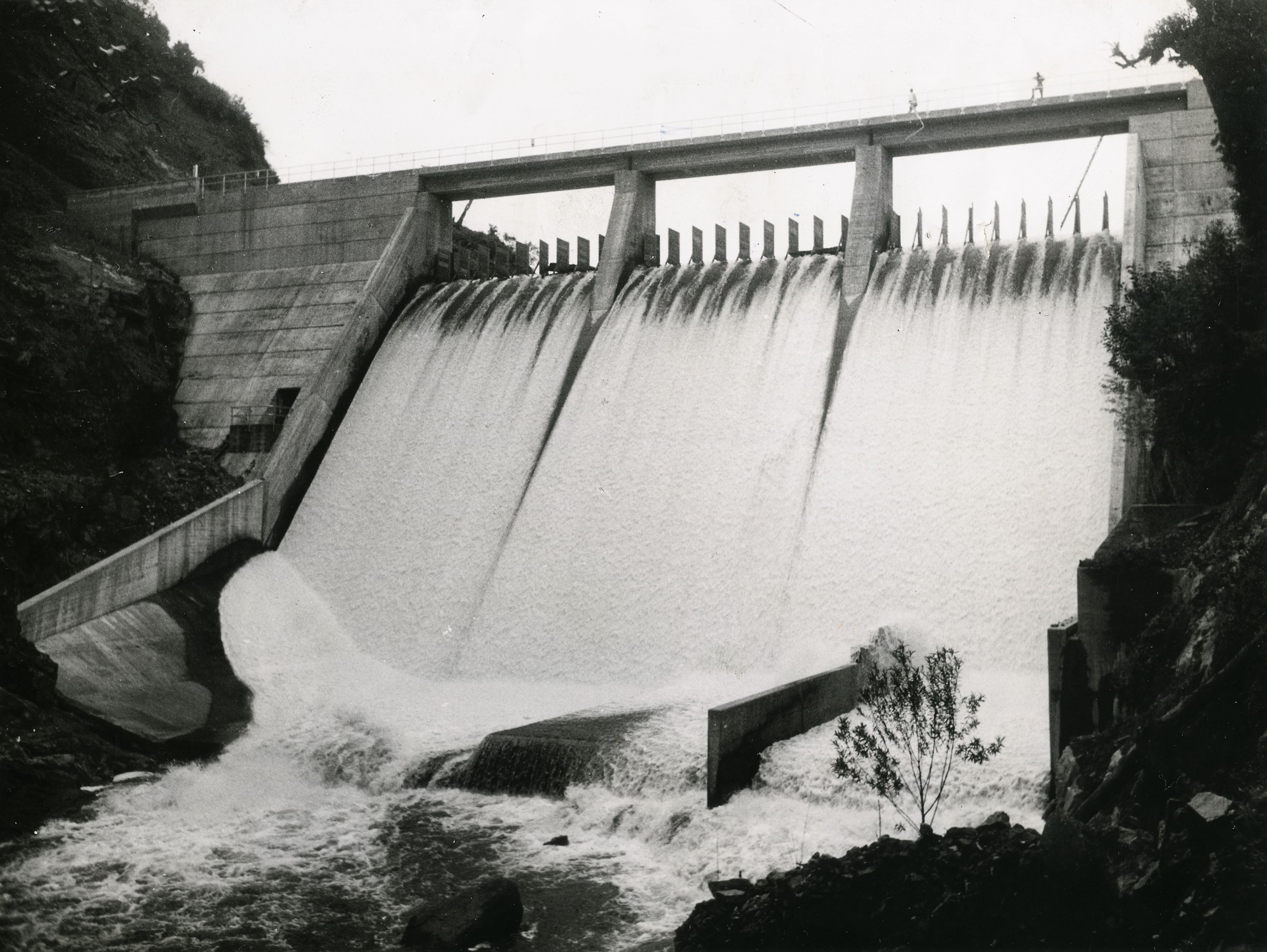 Fotografia do Fundo Correio da Manhã, sob a guarda do Arquivo Nacional.